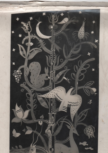 Grand panneau en glace gravée représentant une scène de la nature, arbre ou plante et animaux, de Pierre Lardin.